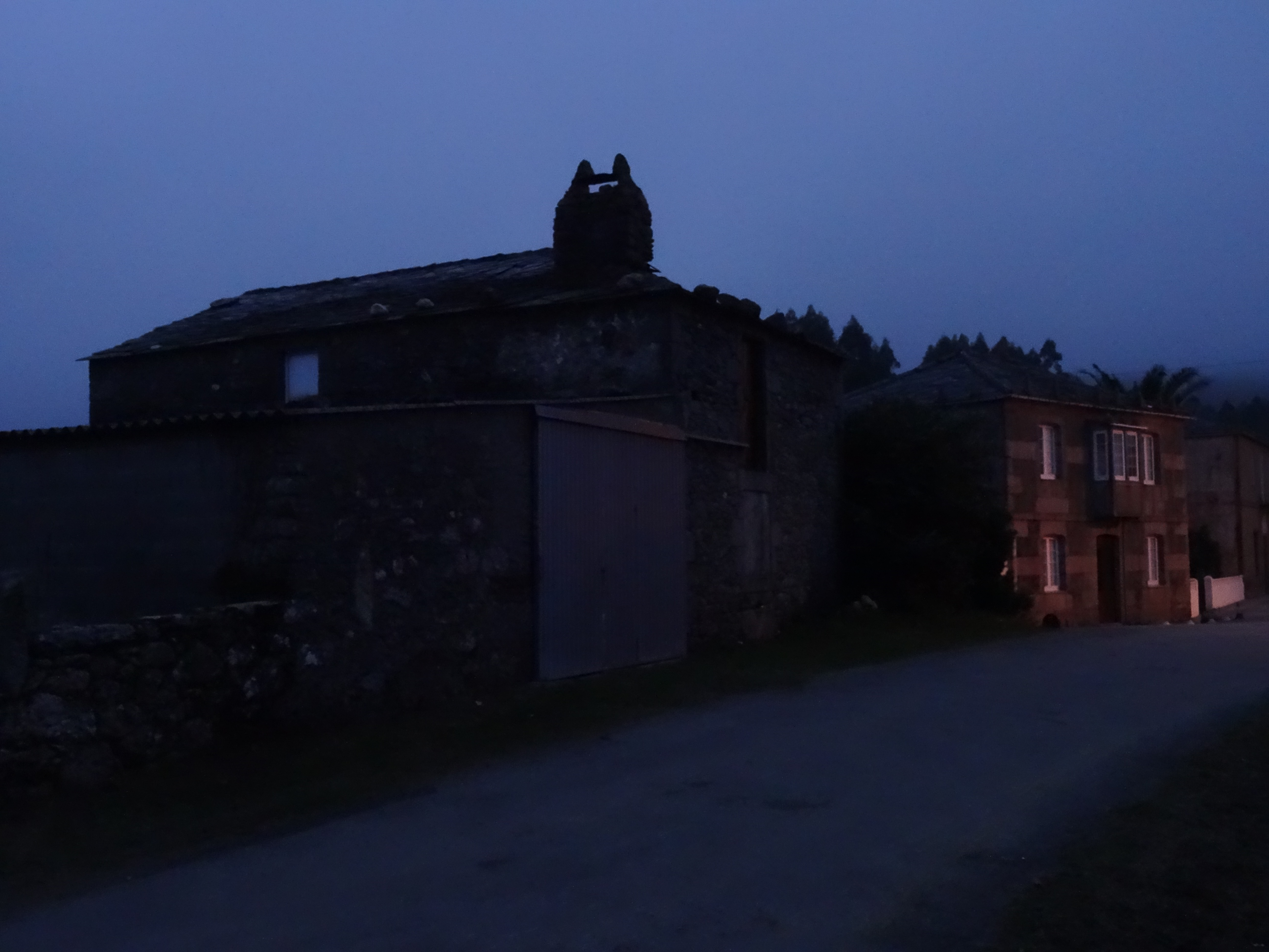 Ver título.